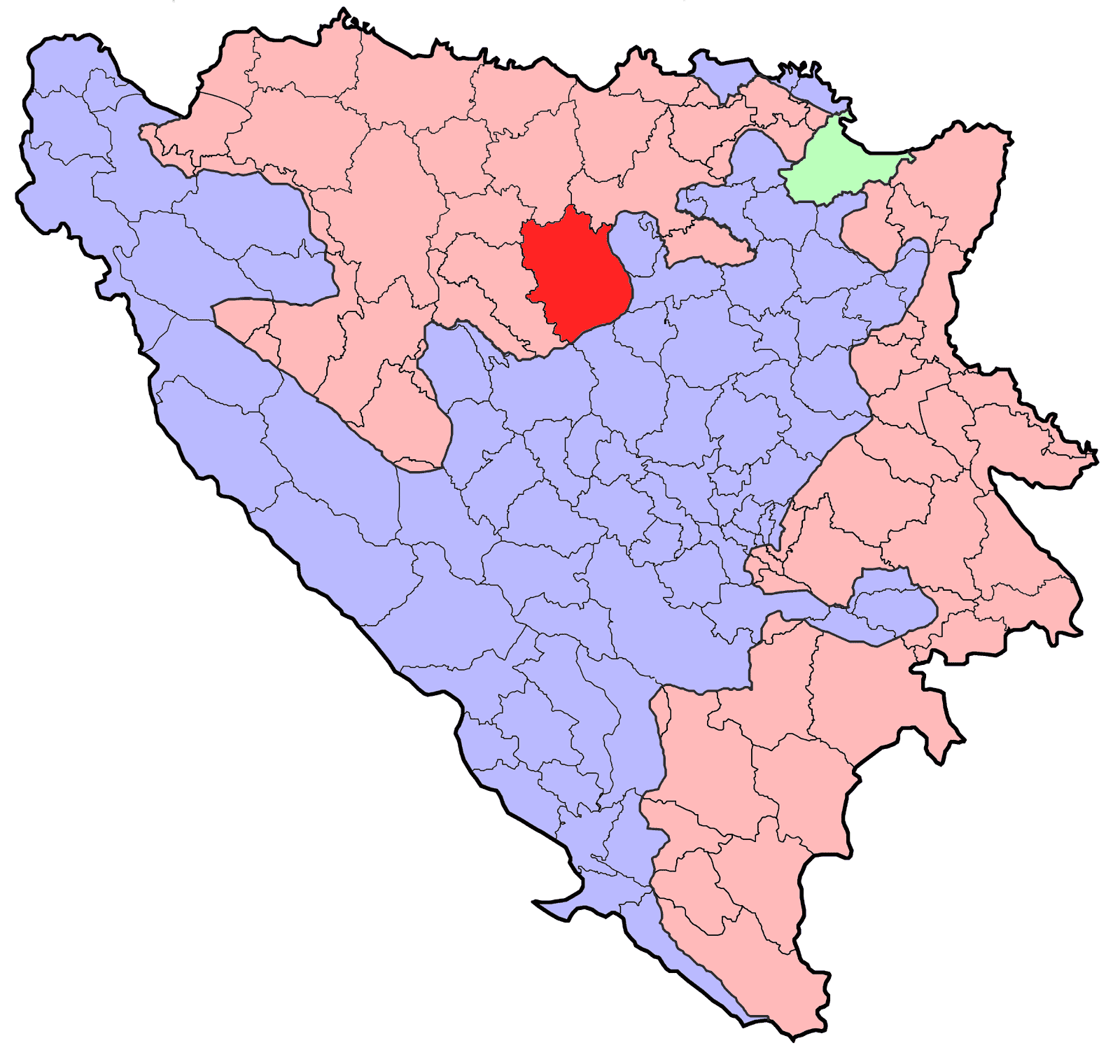 Republika Srpska (BiH) municipality